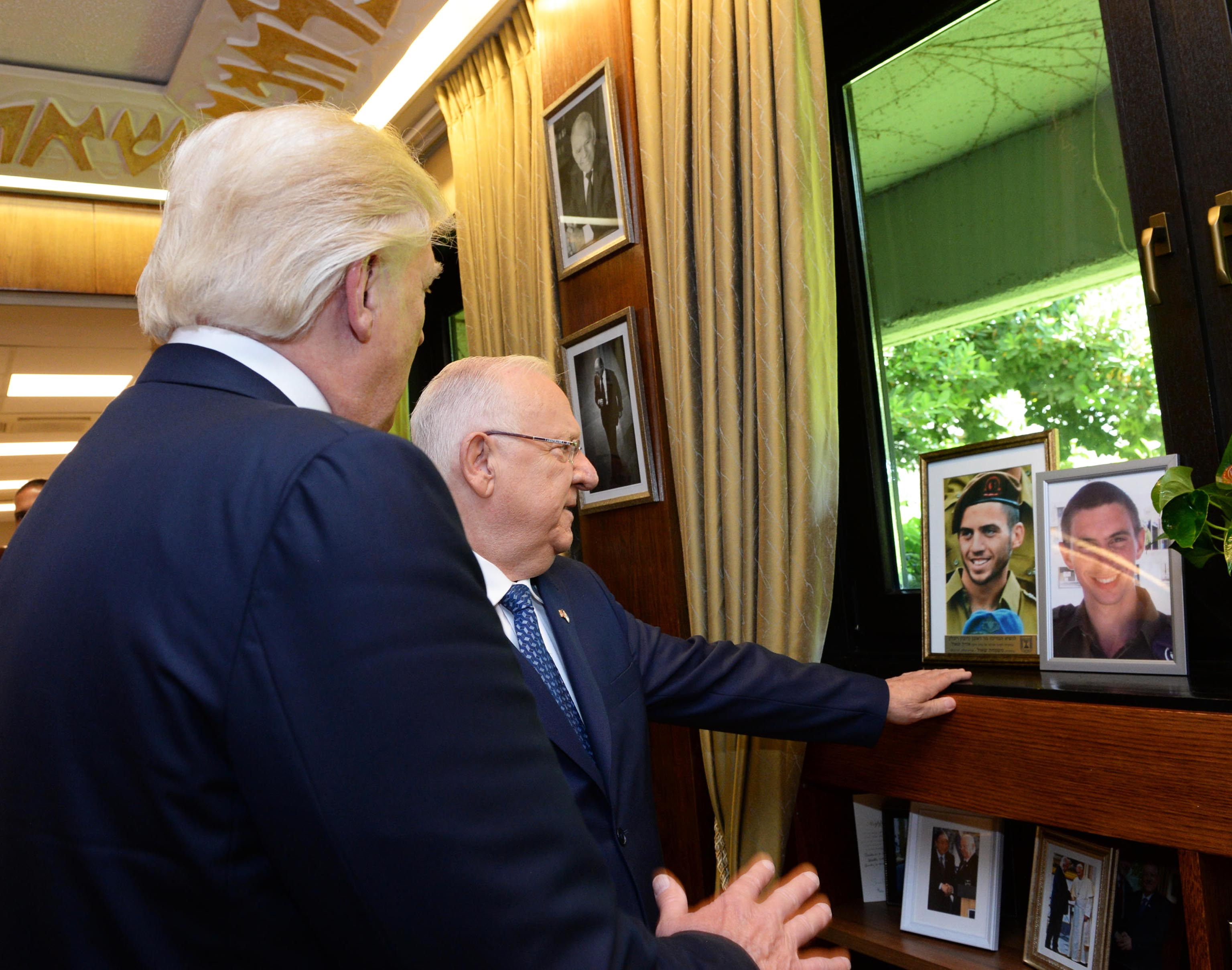 נשיא מדינת ישראל ראובן ריבלין מקבל את פני נשיא ארצות הברית דולנד טראמפ בבית הנשיא. מציג את תמונותיהם של החיילים הנעדרים ממבצע צוק איתן: הדר גולדין מימין ואורון שאול משמאל